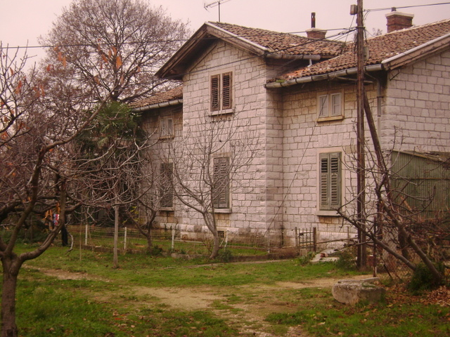 Kolodvorska zgrada u Poreču na ukinutoj pruzi "Parenzana"